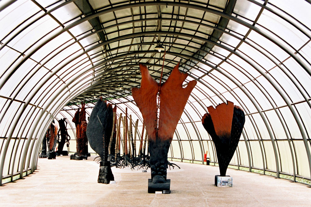 (Portuguese) Detalhe do Espaço Franz Krajcberg, Curitiba, Brasil